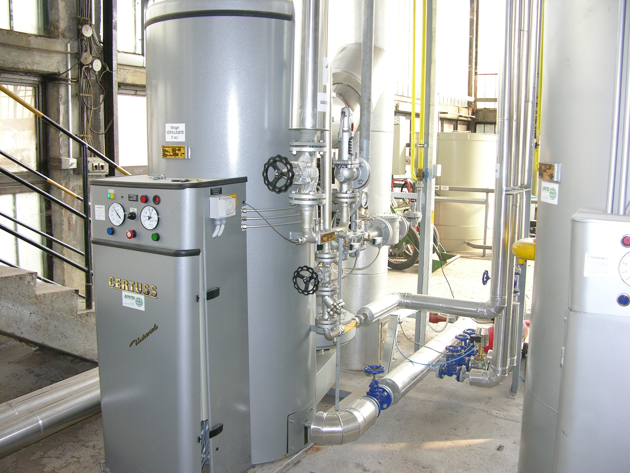 Gyorsgőzfejlesztő beépítése egy Kórház rendszerébe